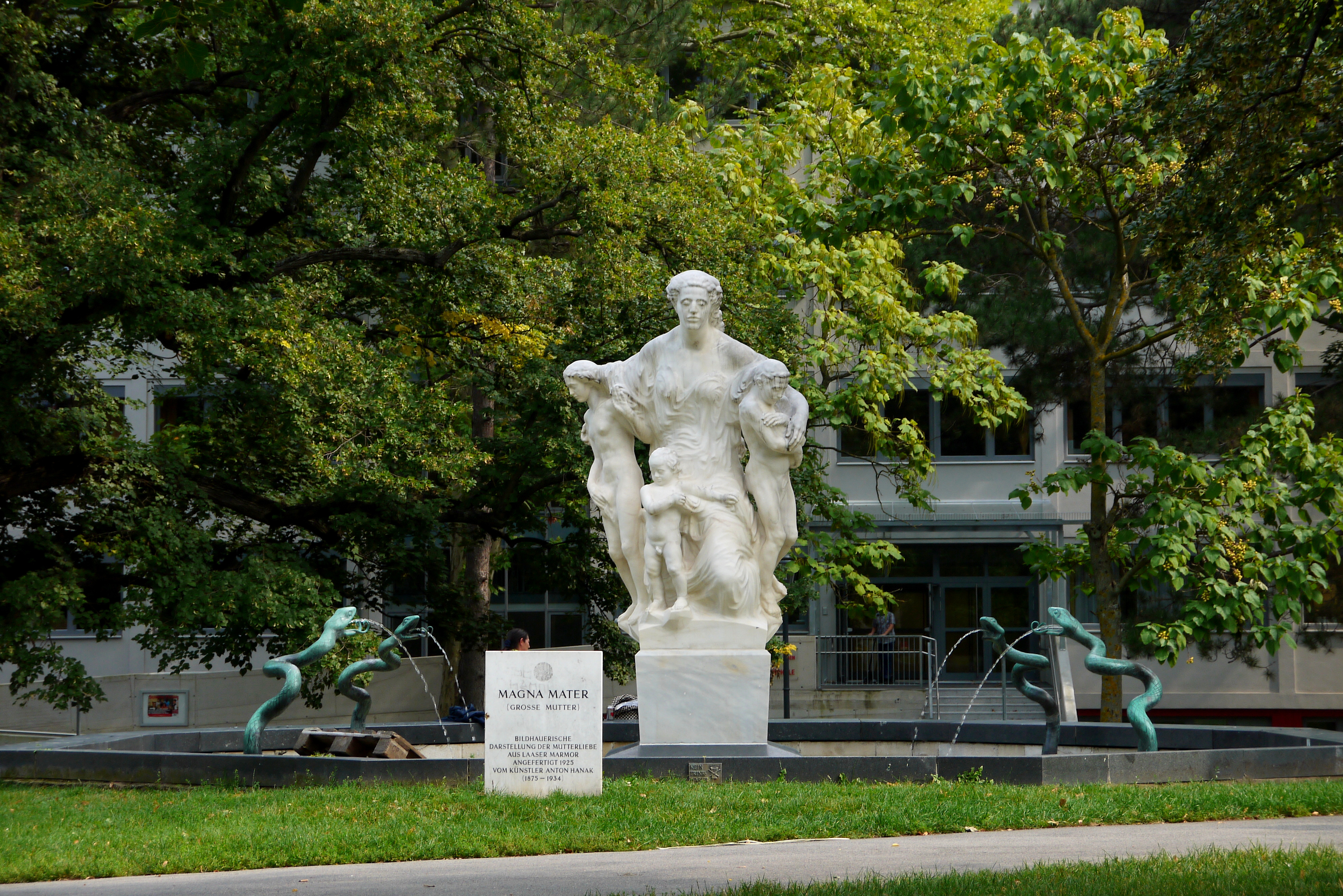 Figuren im Rathauspark